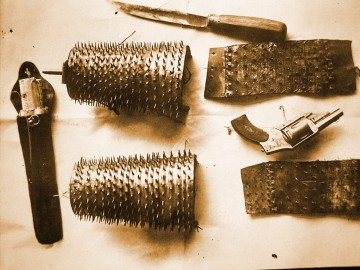 O Punhal, o revolver e as braçadeiras de couro e metal utilizadas pelo anarquista Jean-Jacques Liabeuf em sua vingança contra os policiais corruptos que o haviam prendido por proxenetismo, quando Liabeuf tentava convencer prostitutas a abandonar a profissão.